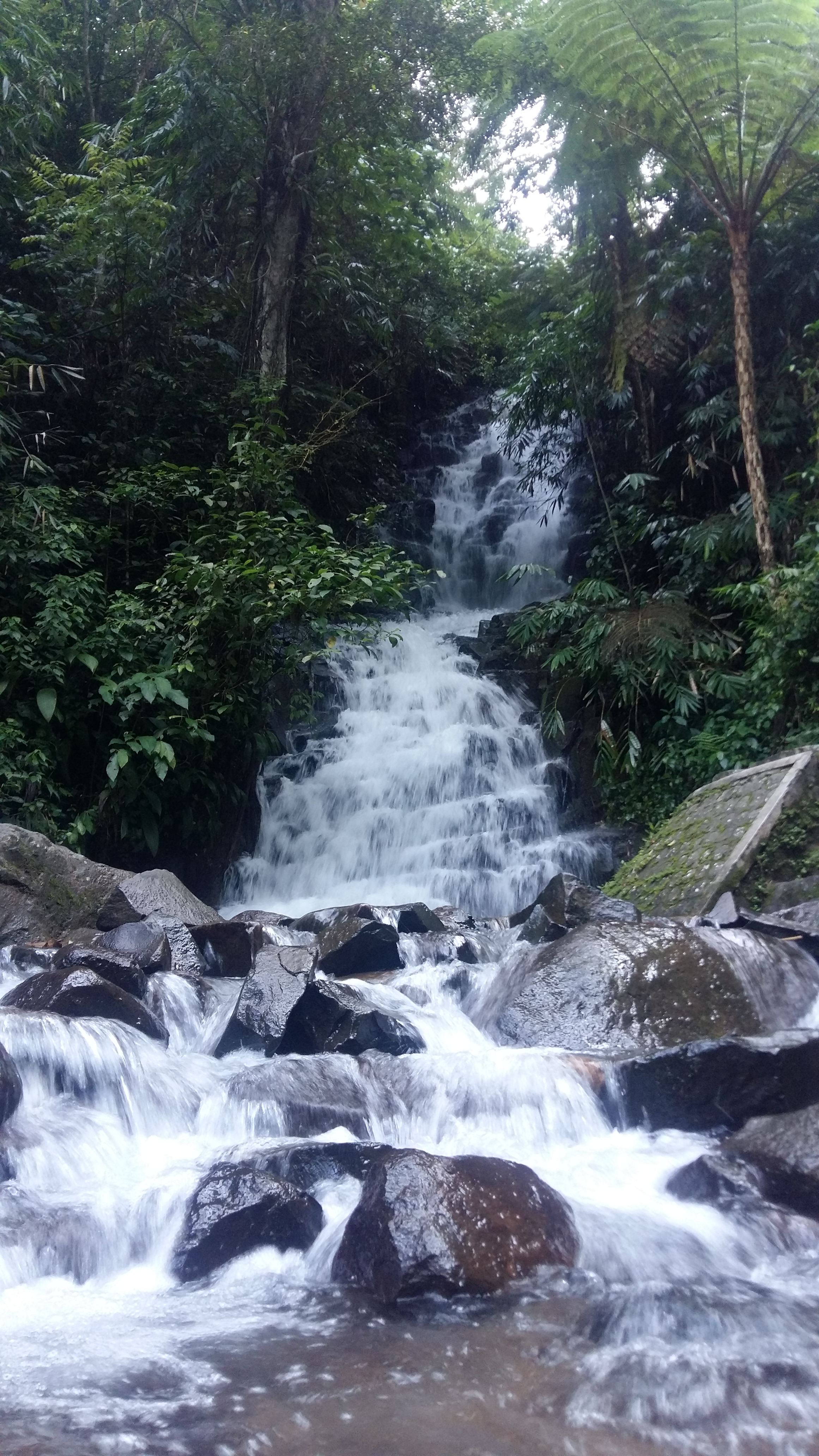 Air Terjun Ironggolo merupakan salah satu air terjun di dusun Besuki, Kabupaten Kediri